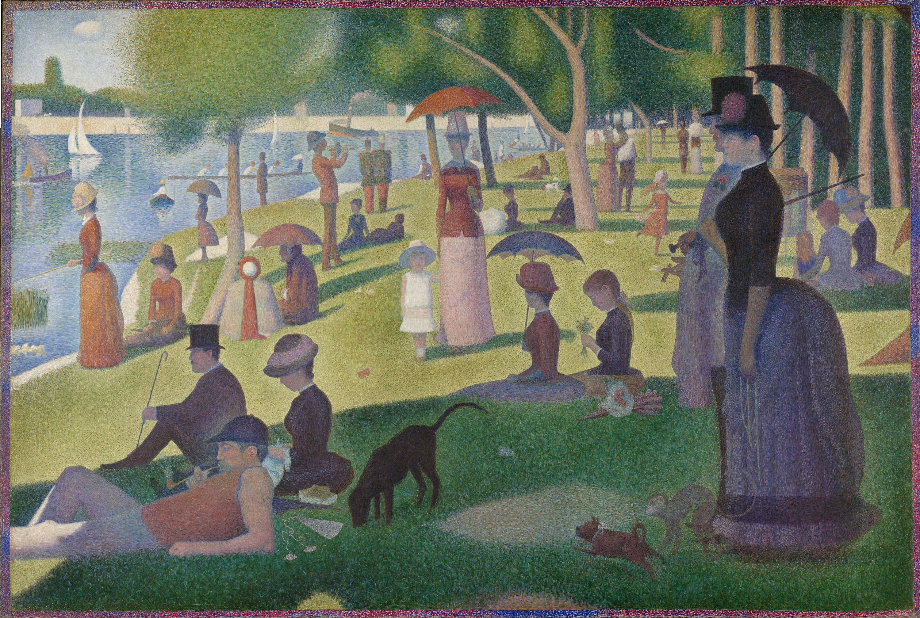 Bassin de Courbevoie-Asnières, Seine, Hauts-de-Seine, France.